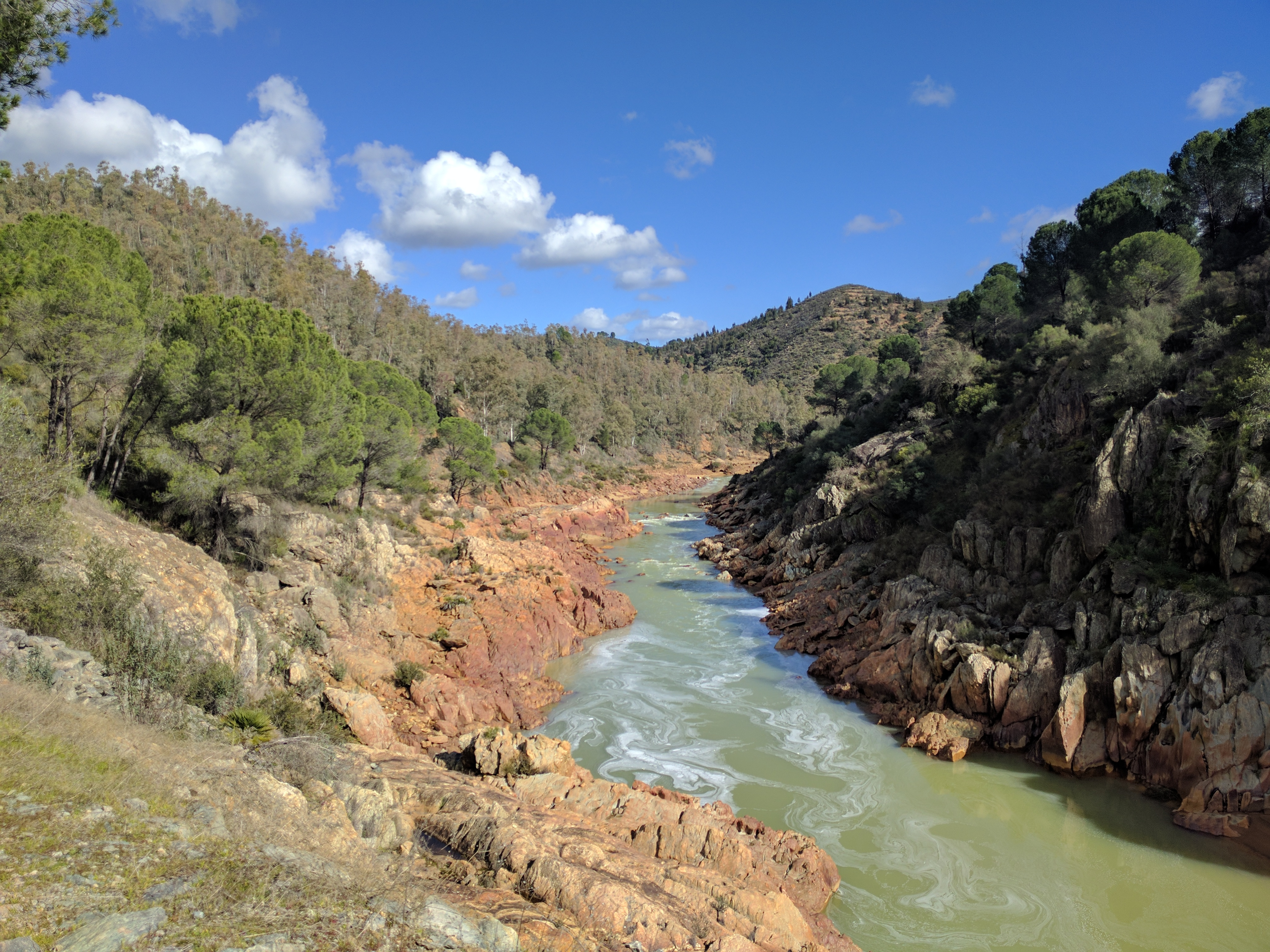 Río Odiel cerca de Sotiel Coronada, Huelva